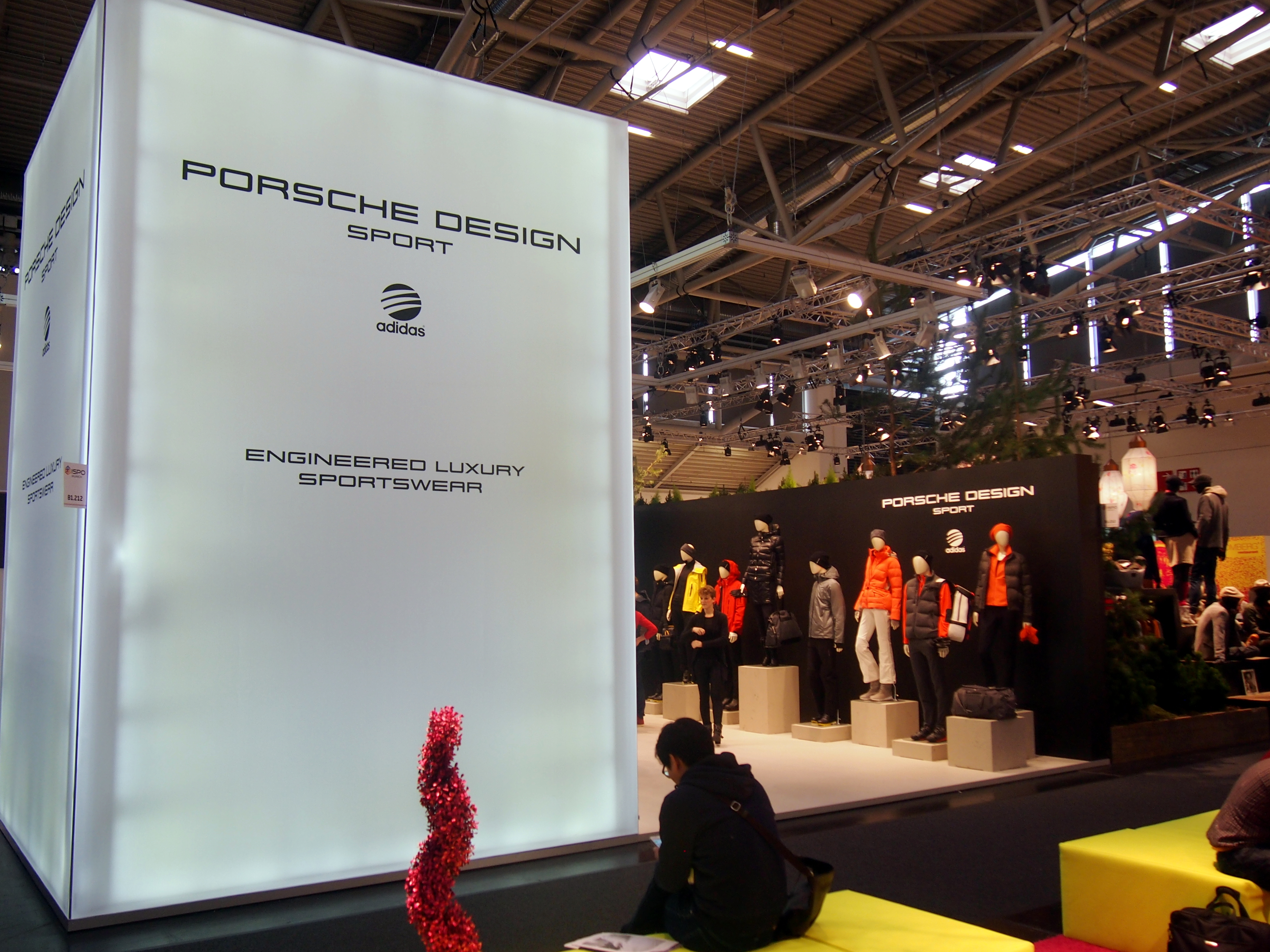 Ruhebereich mit Porsche Design Aufsteller auf der ISPO 2014 in München